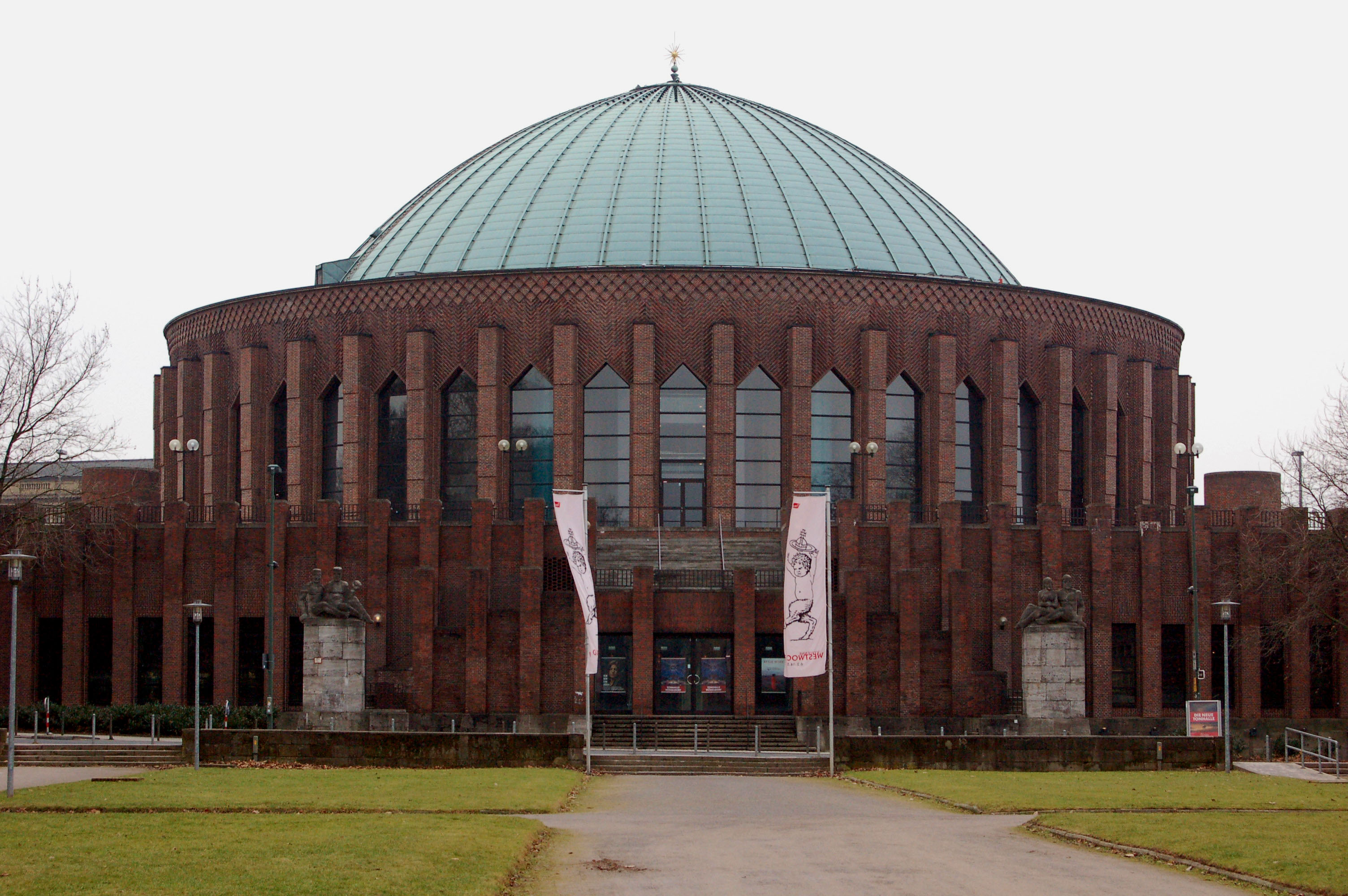 Beschreibung: Tonhalle Düsseldorf, Blick vom Ehrenhof. Architekt: Wilhelm Kreis Source: selbst fotografiert, Februar 2006 Photographer: Alice Wiegand, (Lyzzy)